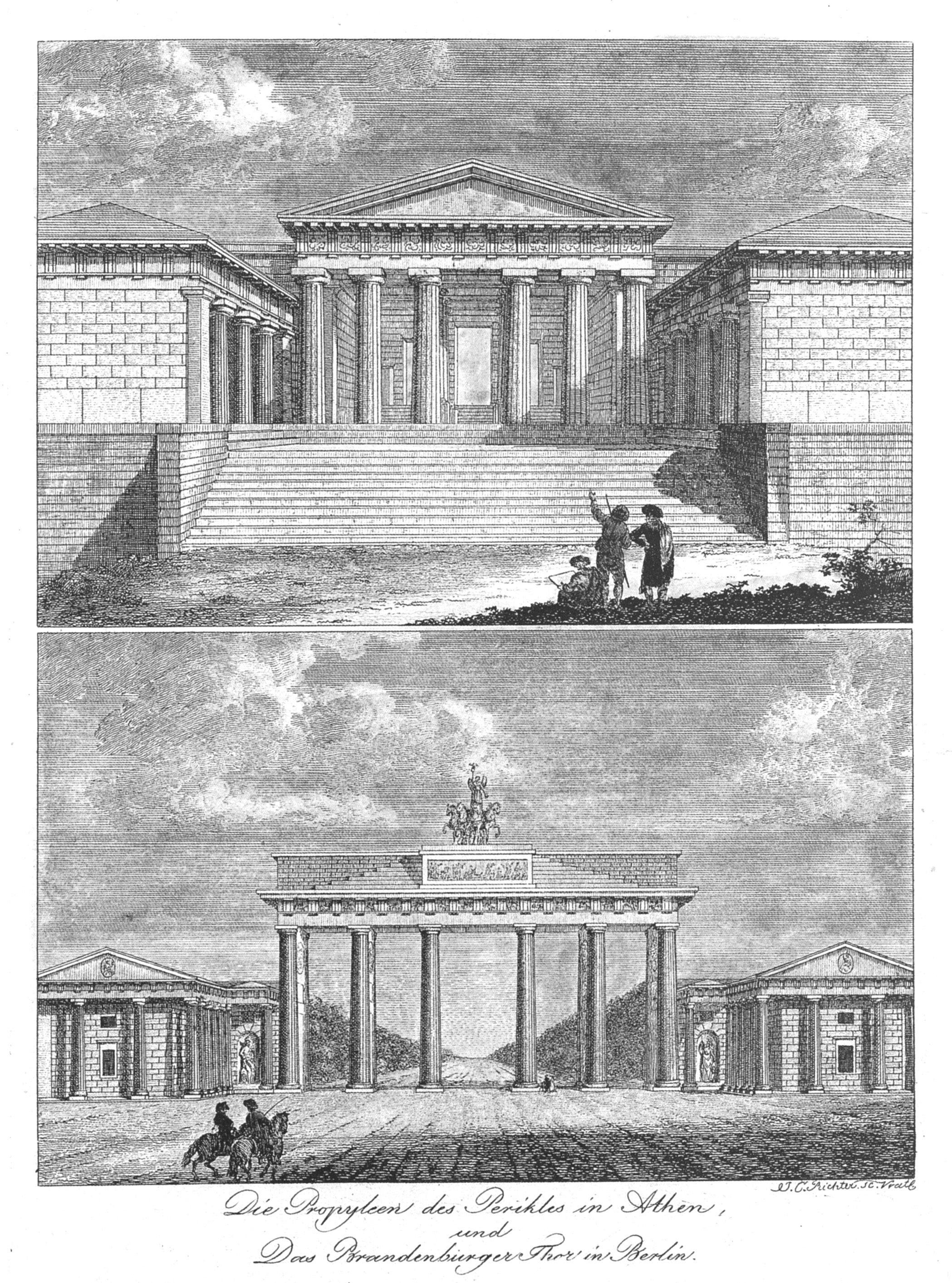 Stich von Johann Carl Richter in welchem er die Athener Propyläen, die dem Brandenburger Tor als Vorbild dienten, diesem gegenüberstellt.